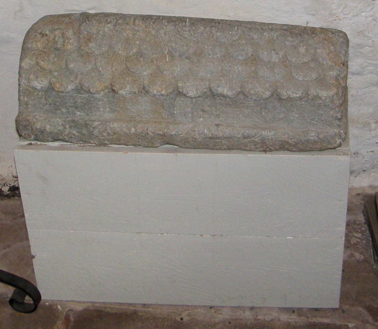 Norderhov kirke, gravstein fra middelalderen